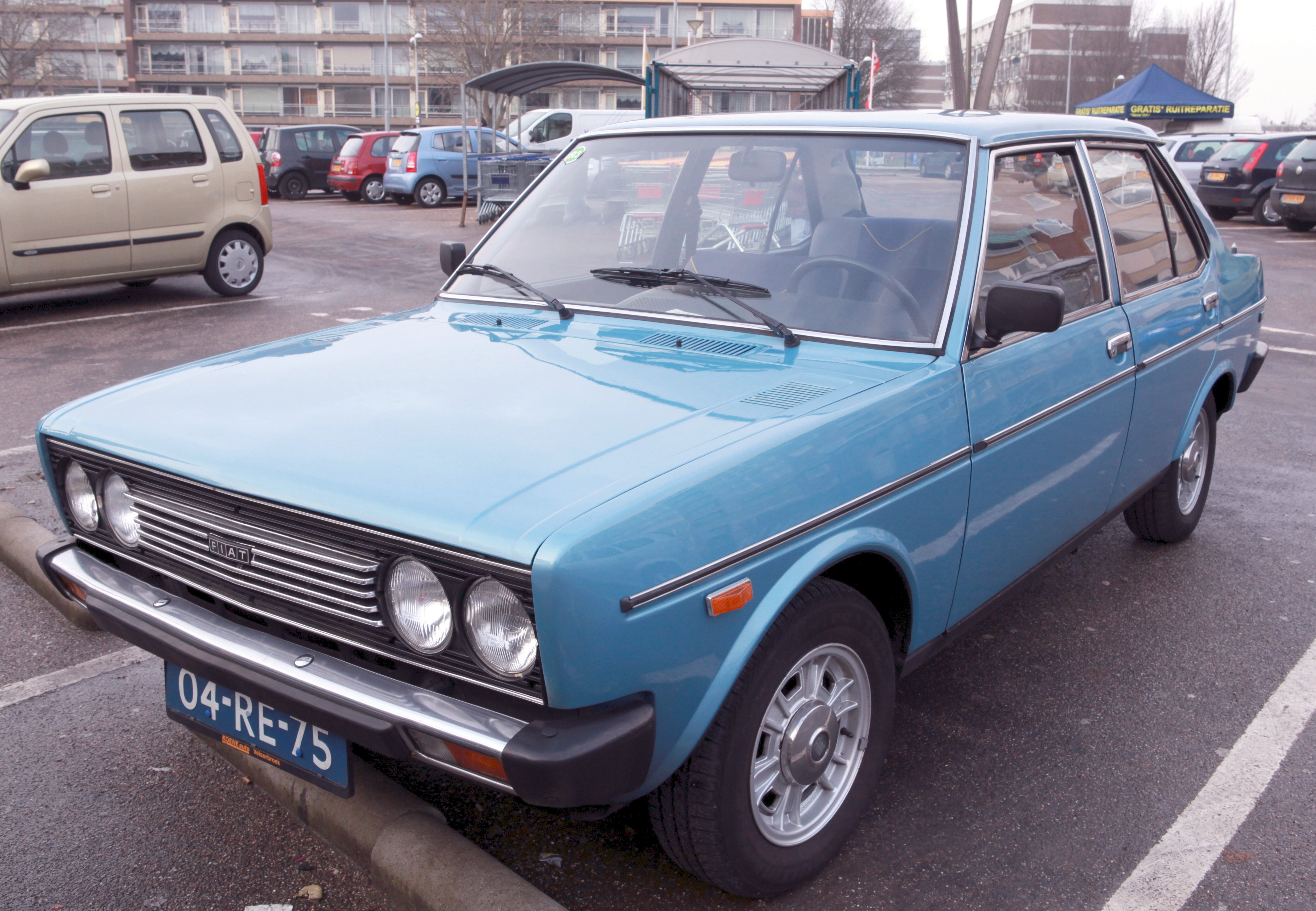 Fiat 131 S Mirafiori 1600